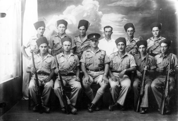 רבים מהחלוצים בוני הקיבוצים התגייסו לצבא הבריטי בתפקידי שמירה